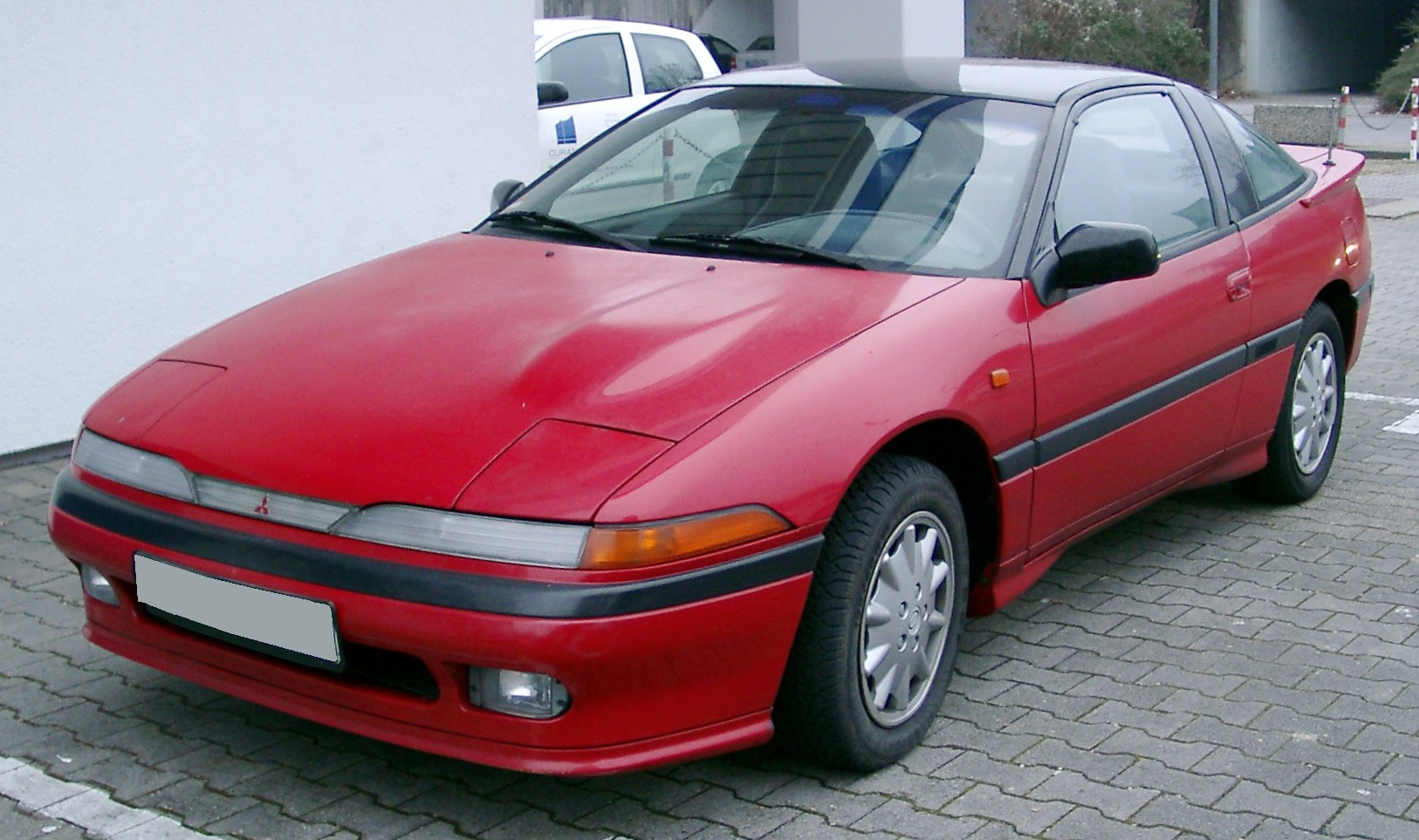 Mitsubishi Eclipse, 1. Generation